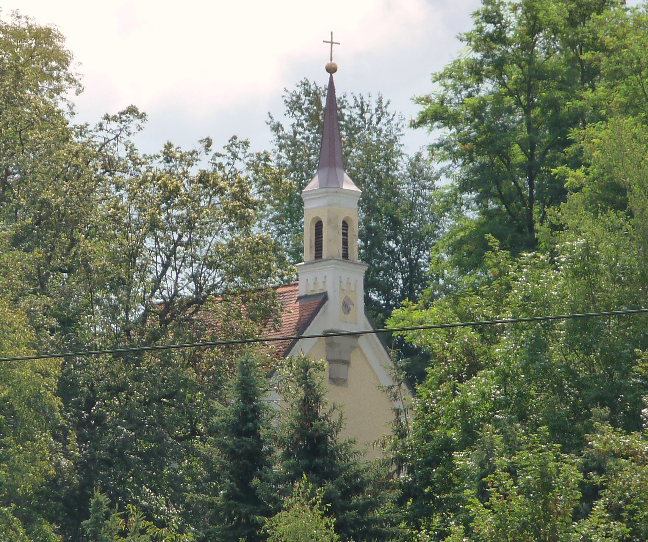 Die Wallfahrtskapelle Maria Hilf auf dem Frauenberg bei Pleinting, Stadt Vilshofen